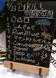 amiinaセトリボード(20150923(1))